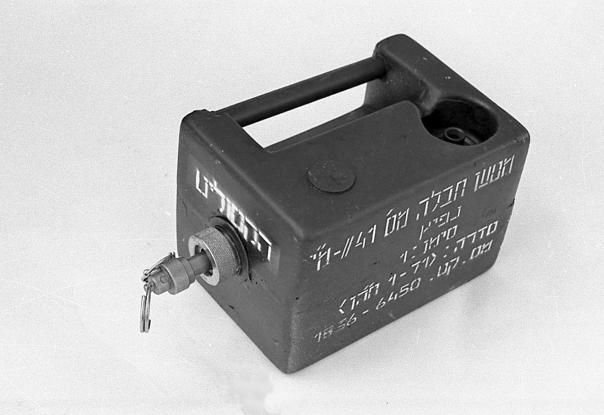 מטען גור